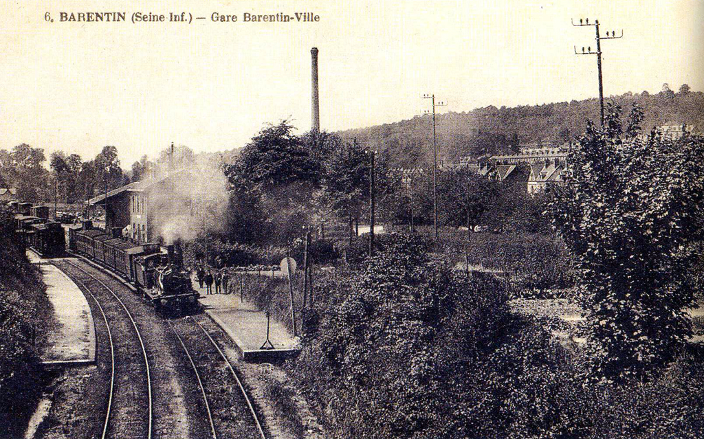 Un train pour Caudebec-en-Caux au départ de la gare de Barentin-Ville.